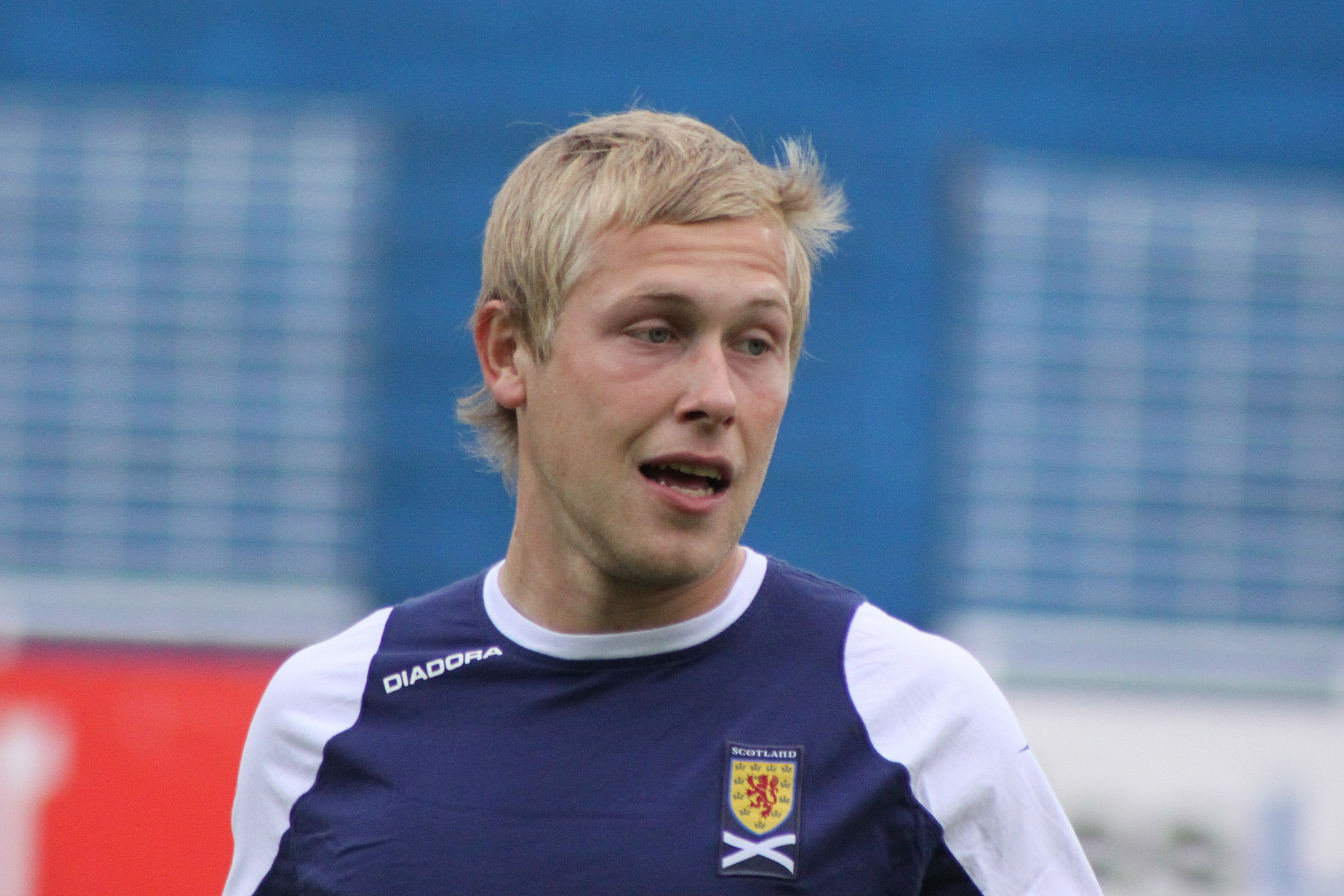 Scott Arfield (FC Falkirk) - Schottische Fußballnationalmannschaft (U-21-Männer) Scott Arfield (Falkirk F.C.) - Scotland national under-21 football team — (2)